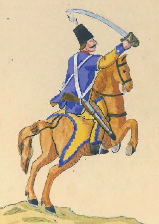 76. Pachołek na koniu z Wojsk Nadwornych Koronnych